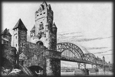 Bridges between Mainz and Wiesbaden - Kaiserbrücke zwischen Mainz und Wiesbaden